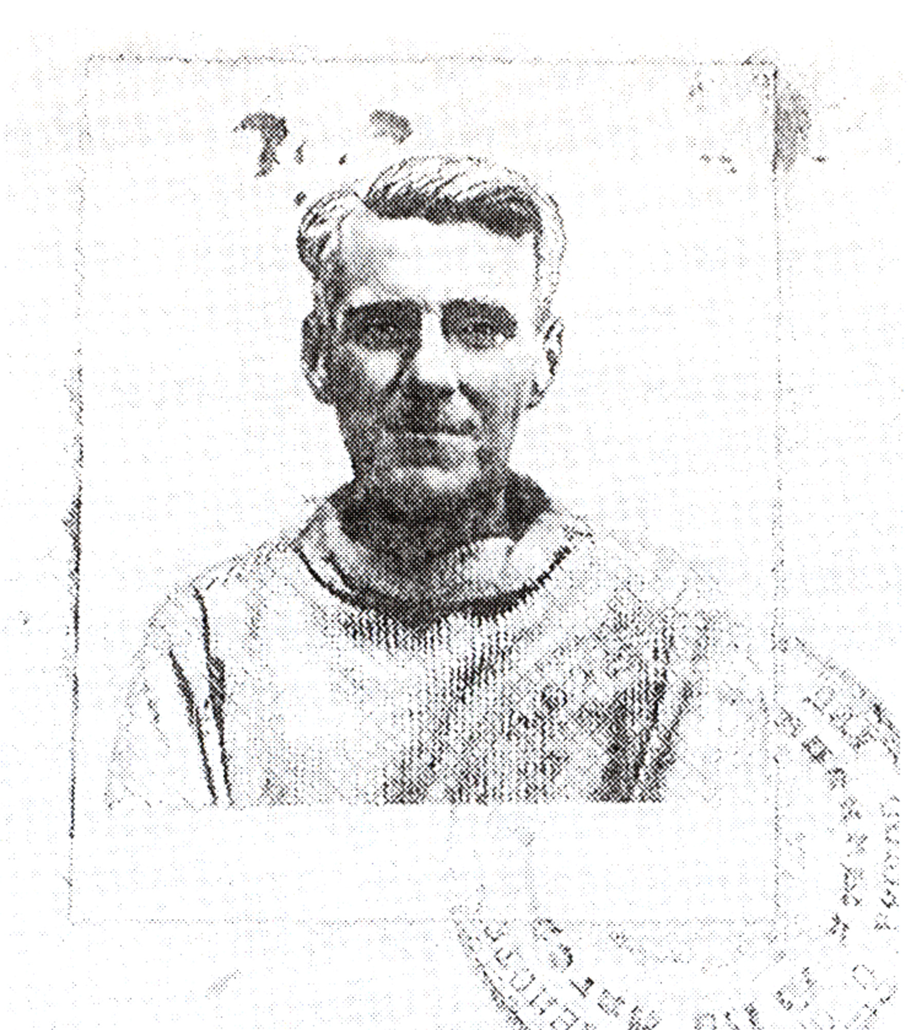 Fotografie Konrada Lorenze okopírovaná z dokumenů, nalezených v ruském zajateckém táboře z Druhé světové války